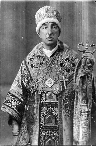 Александр Введенский — один из лидеров обновленческого раскола